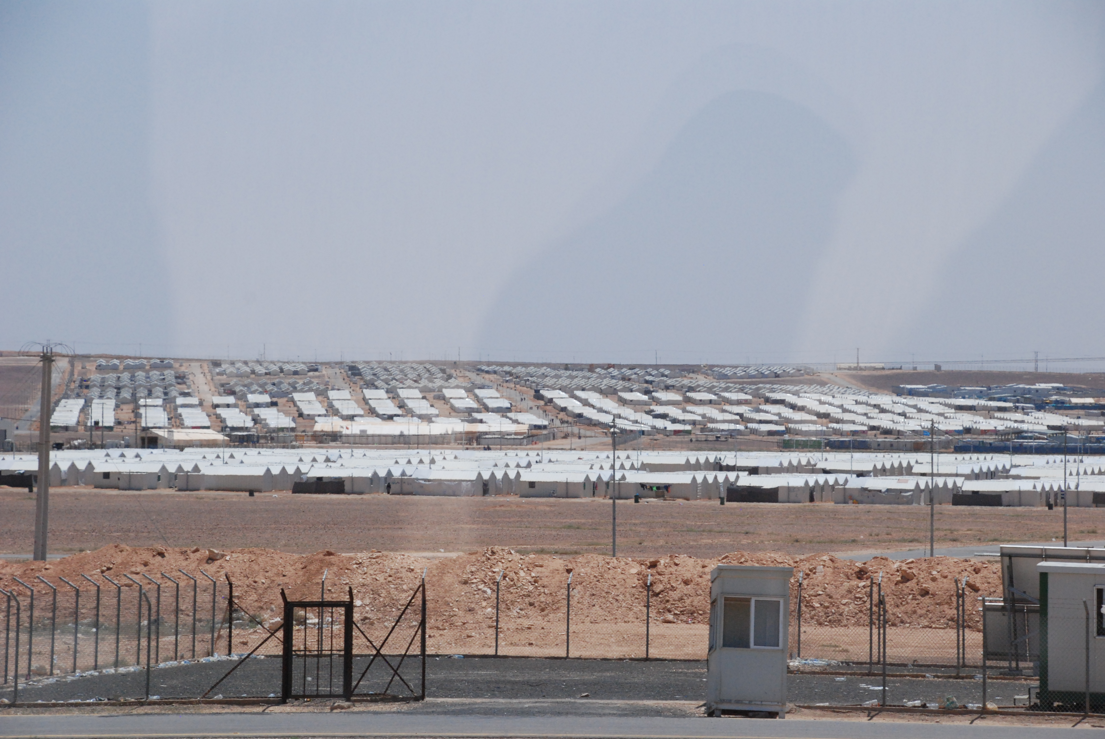 Camp de réfugiés syriens d'Azrac